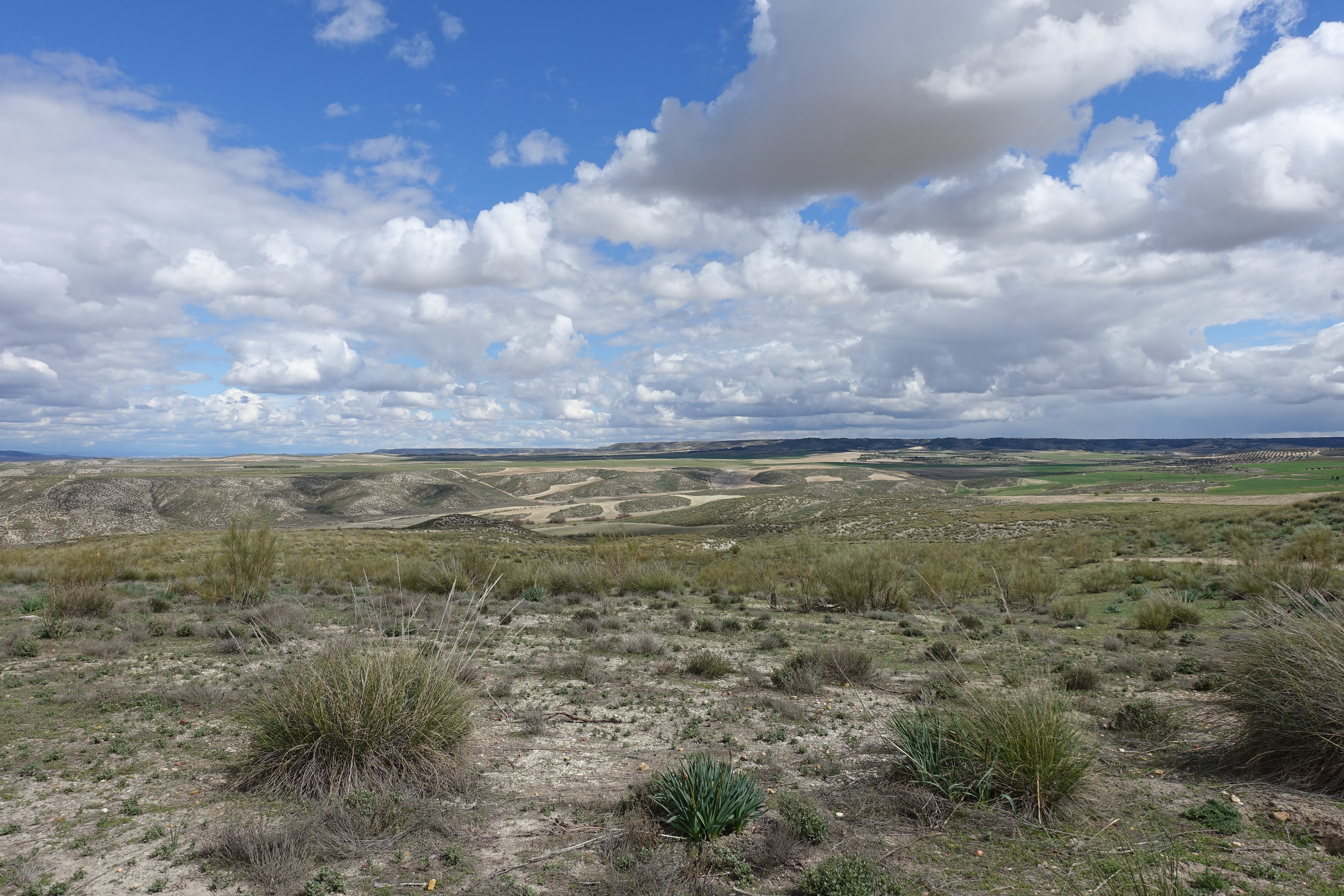 Paisaje en el entorno del cerro de Valdelascasas (Aranjuez).